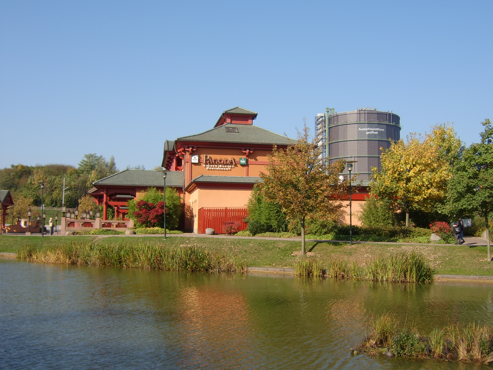 Gasometer vom Centro-Platz aus